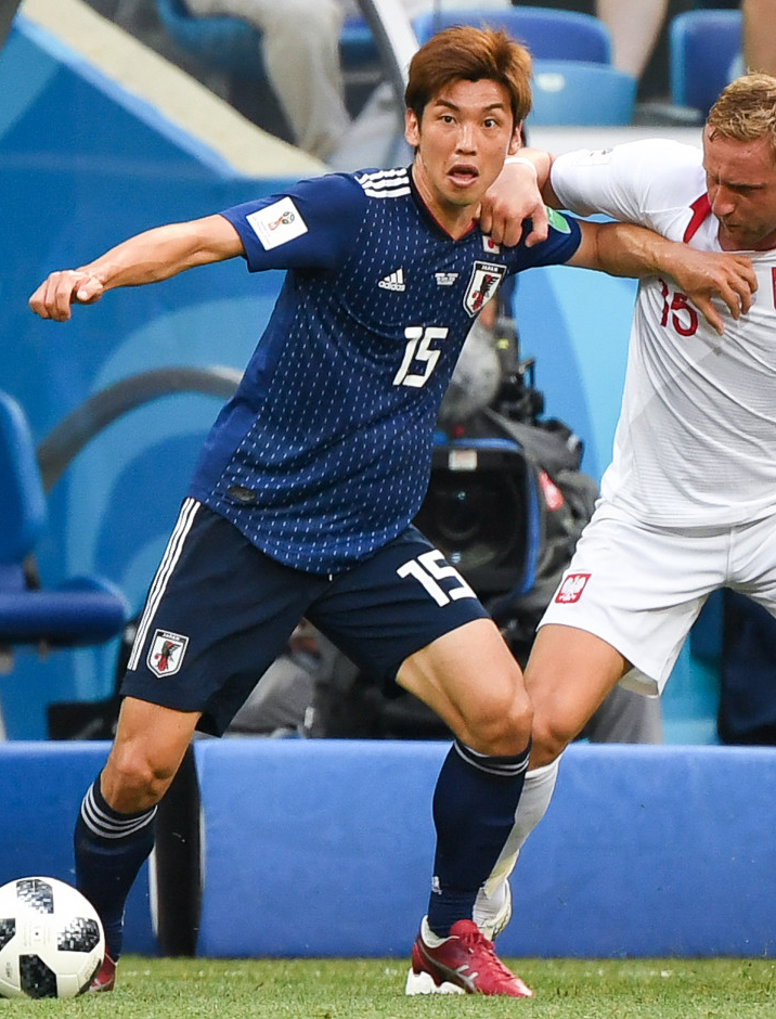 Япония проиграла Польше, но вышла в плей-офф